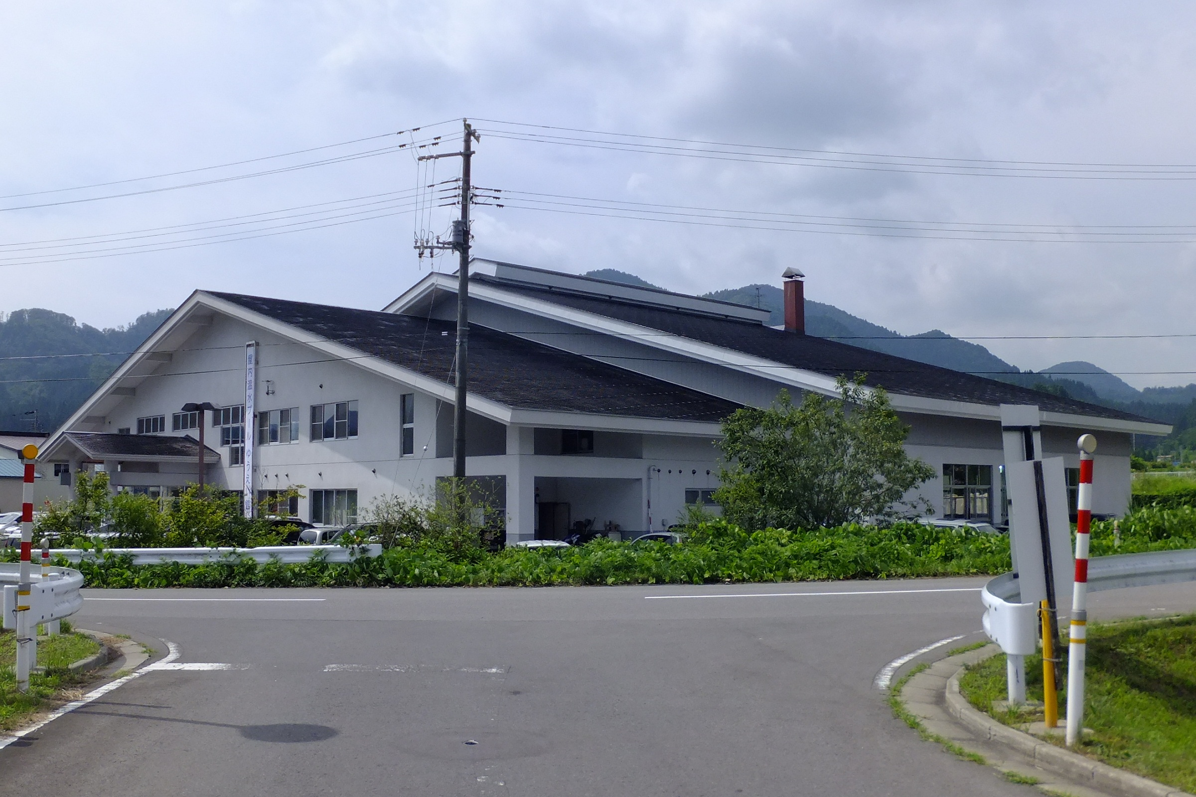 平川市温水プール「ゆうえい館」